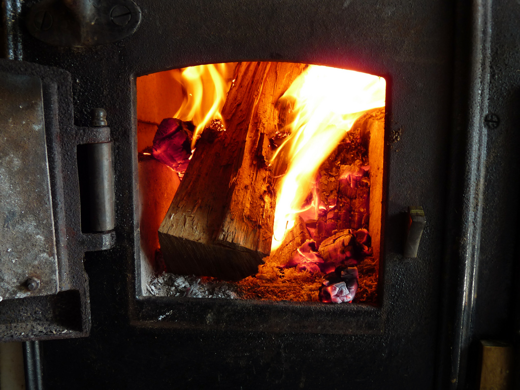 Cociña de leña. Forno. Galicia (Spain)